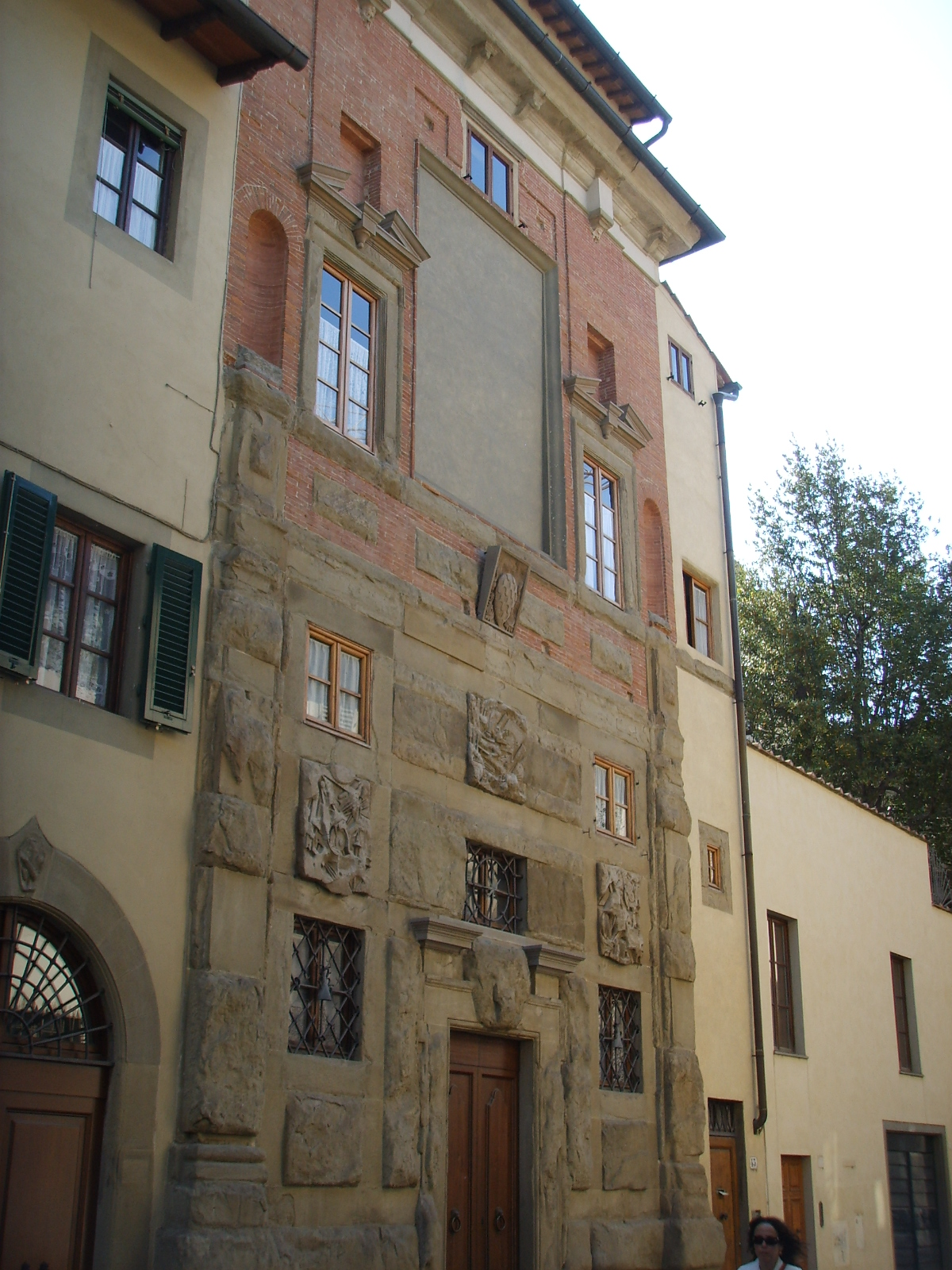 Palazzo_zuccari in Florence